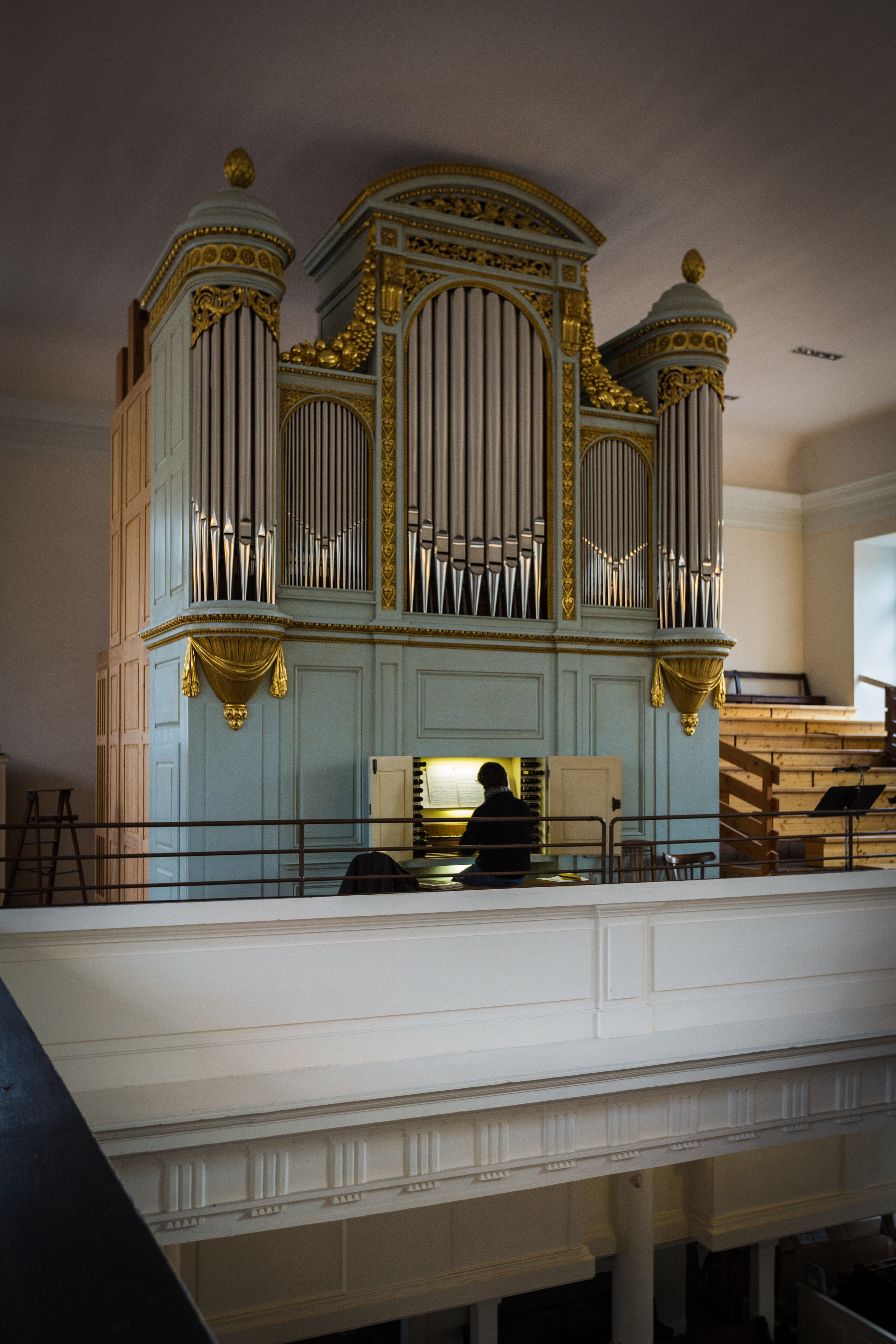 Strasbourg l’orgue de l’église réformée du Bouclier.